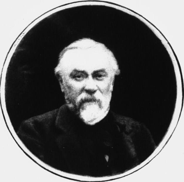 Louis-Paul Davy, ingénieur civil des mines, directeur des mines de fer de Segré, géologue